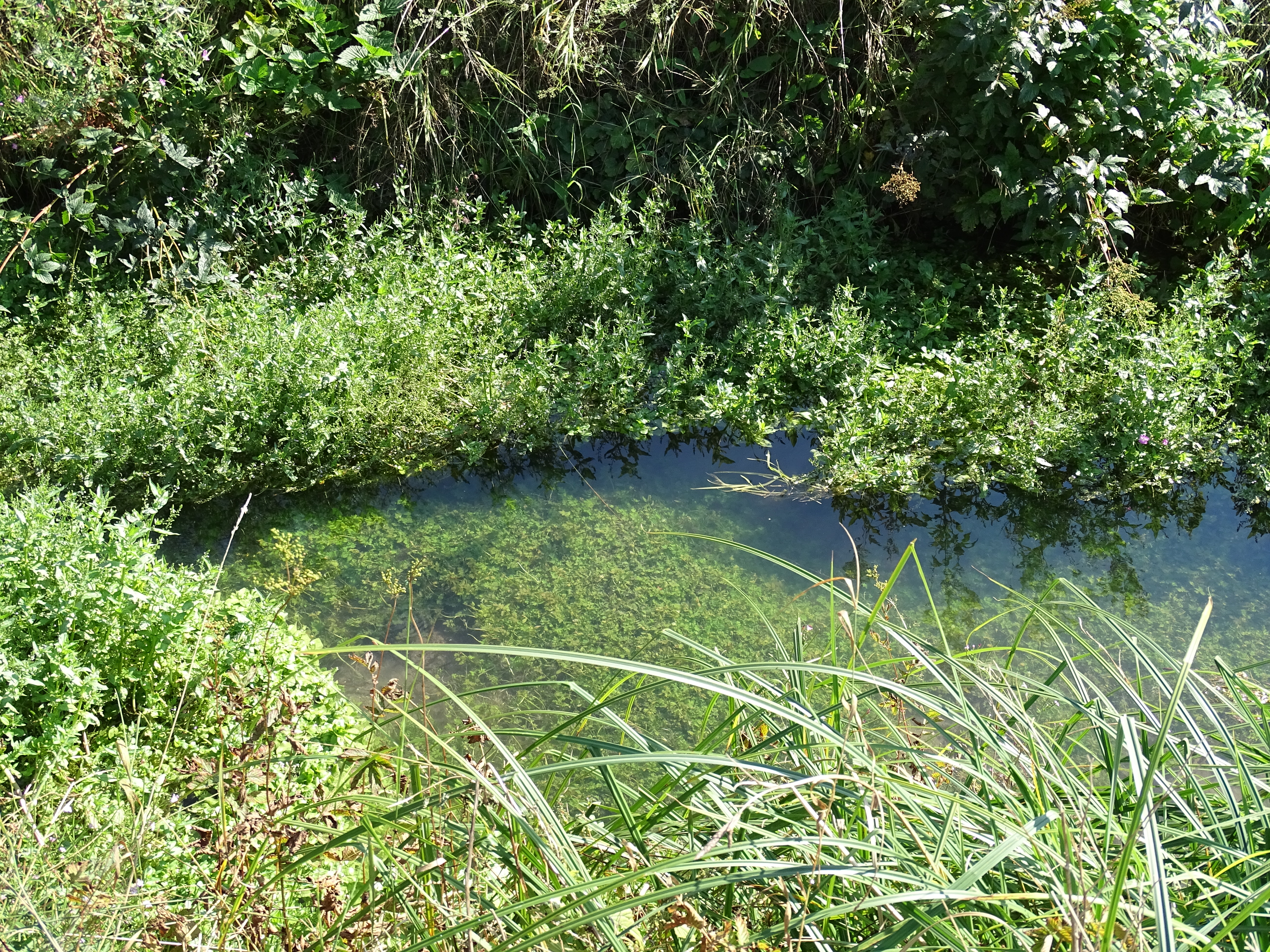 Irm bei der Mühle, unterhalb Gechingens